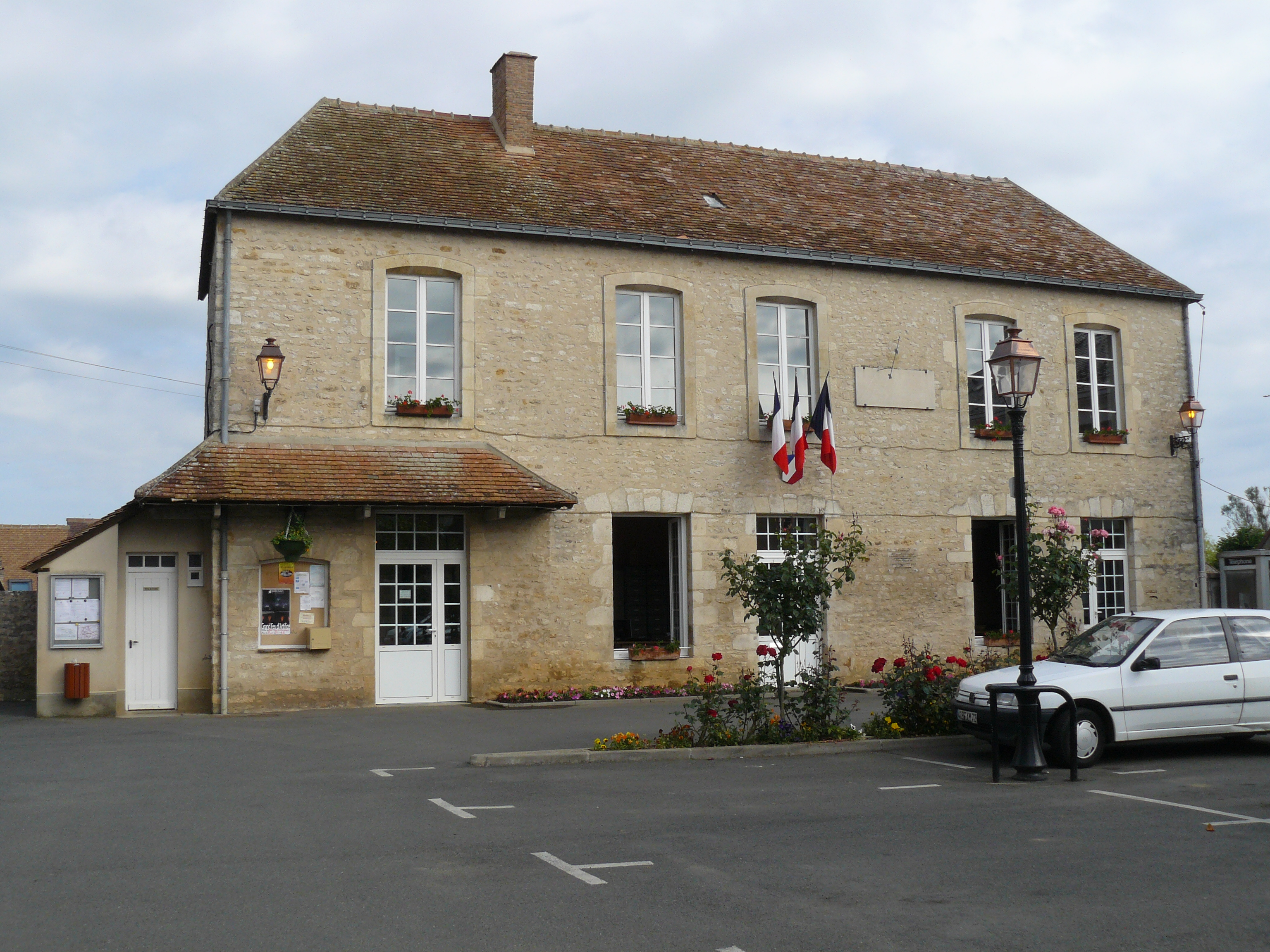 Mairie de Bernay-en-Champagne (France, Pays de la Loire)